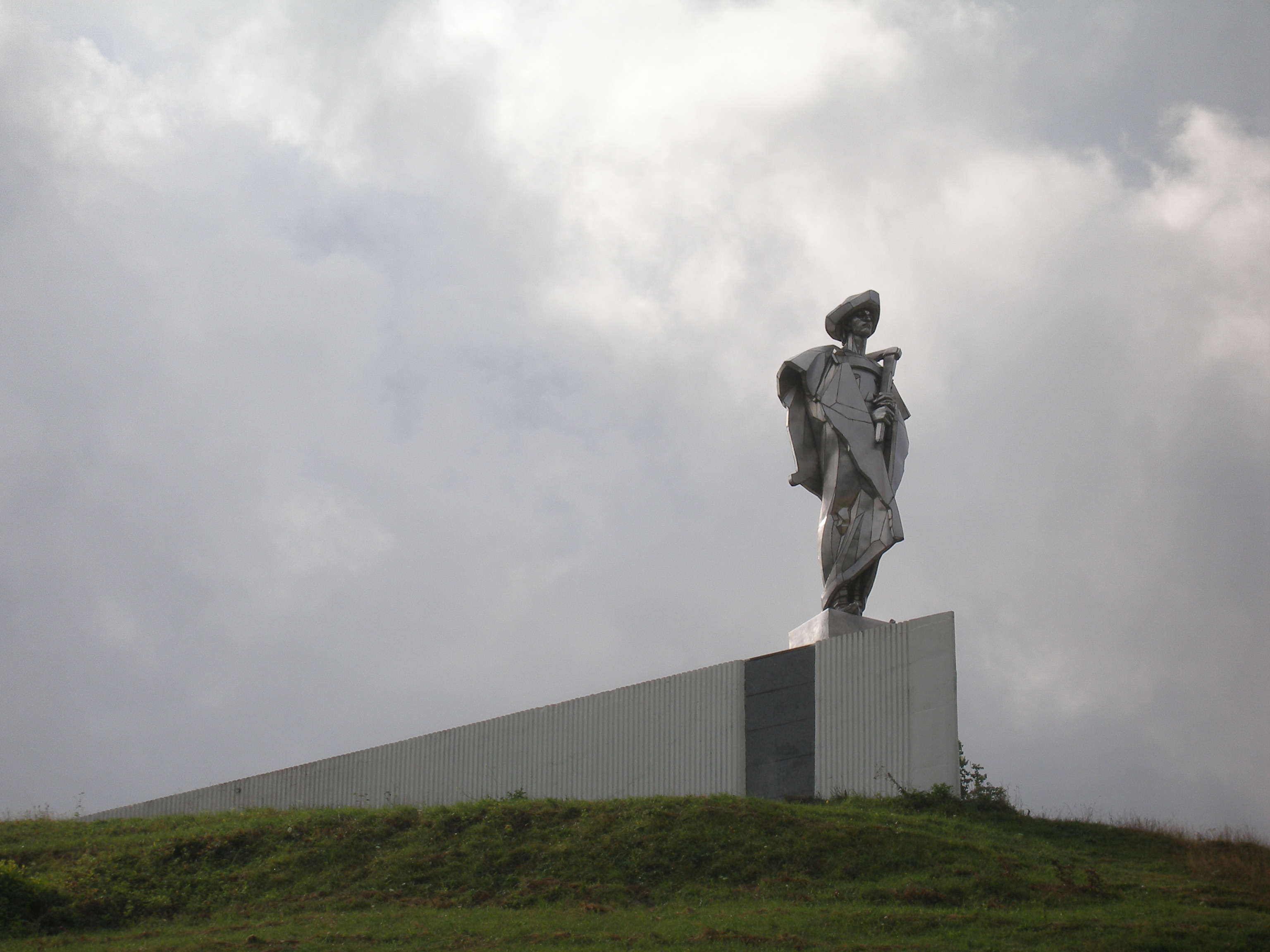 Rázovitá slovenská obec Terchová,návršie s monumentálnou sochou ľudového slovenského hrdinu Juraja Jánošíka. Autor monumentu J.Kulich rok 1988.